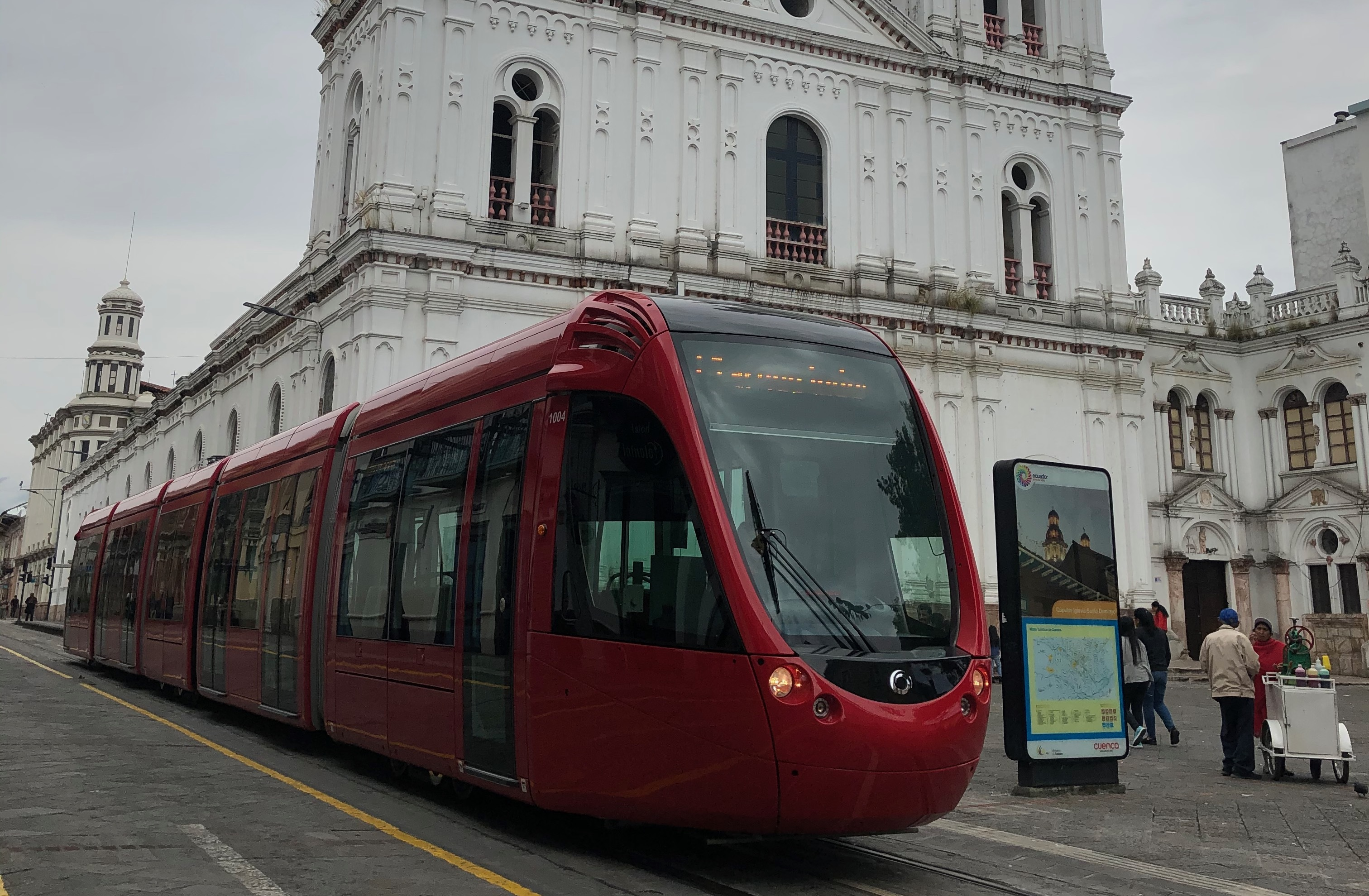 Pasando por el centro histórico